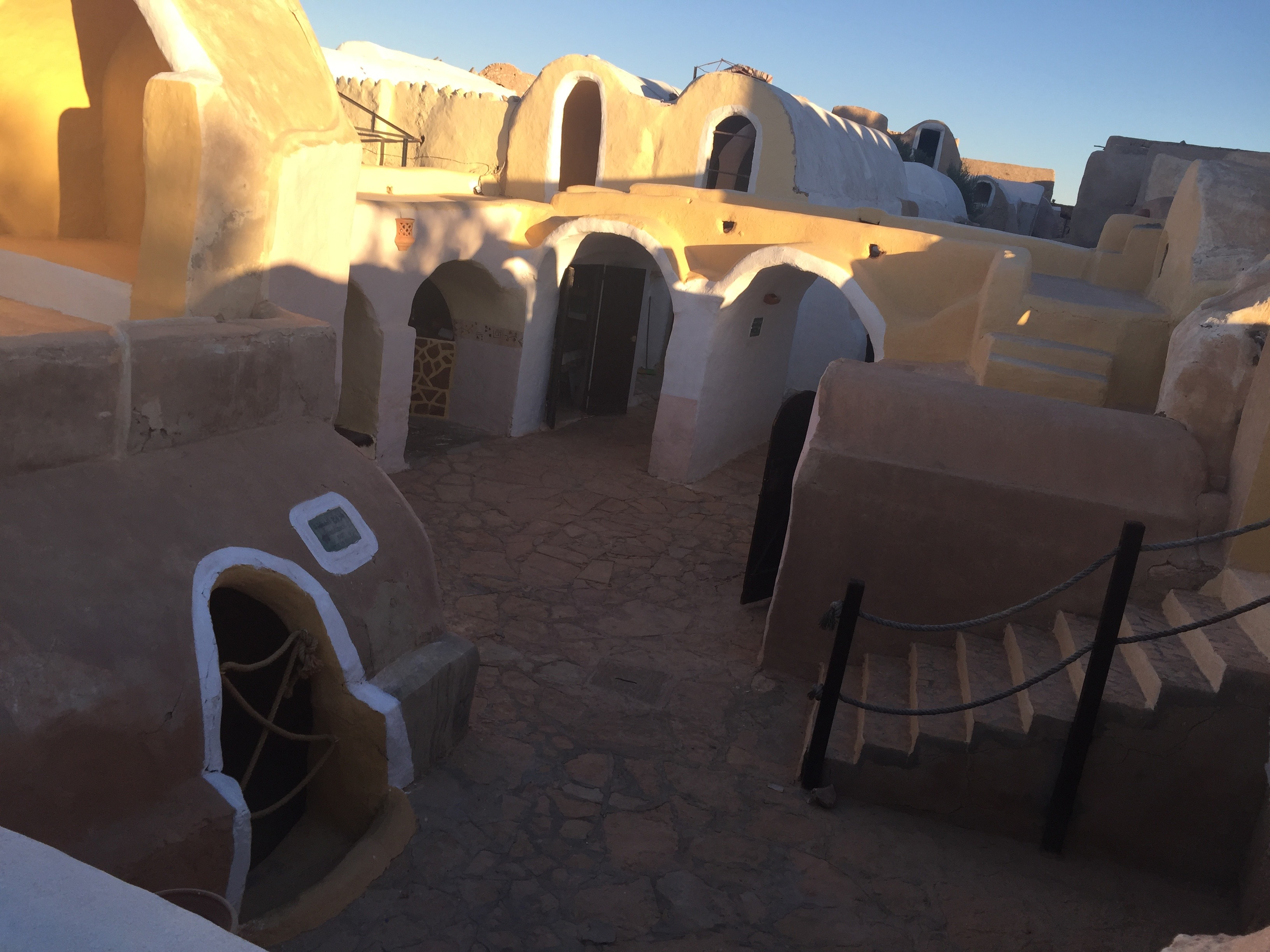 Hôtel Ksar Hadada à l'intérieur juillet 2016.